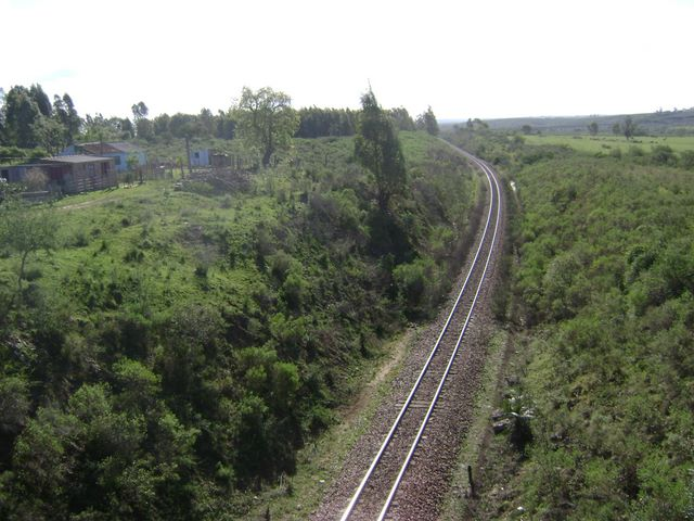 Linha do trem (Cacequi-Rio Grande), que corta o Ibaré e parte do oeste de Lavras do Sul